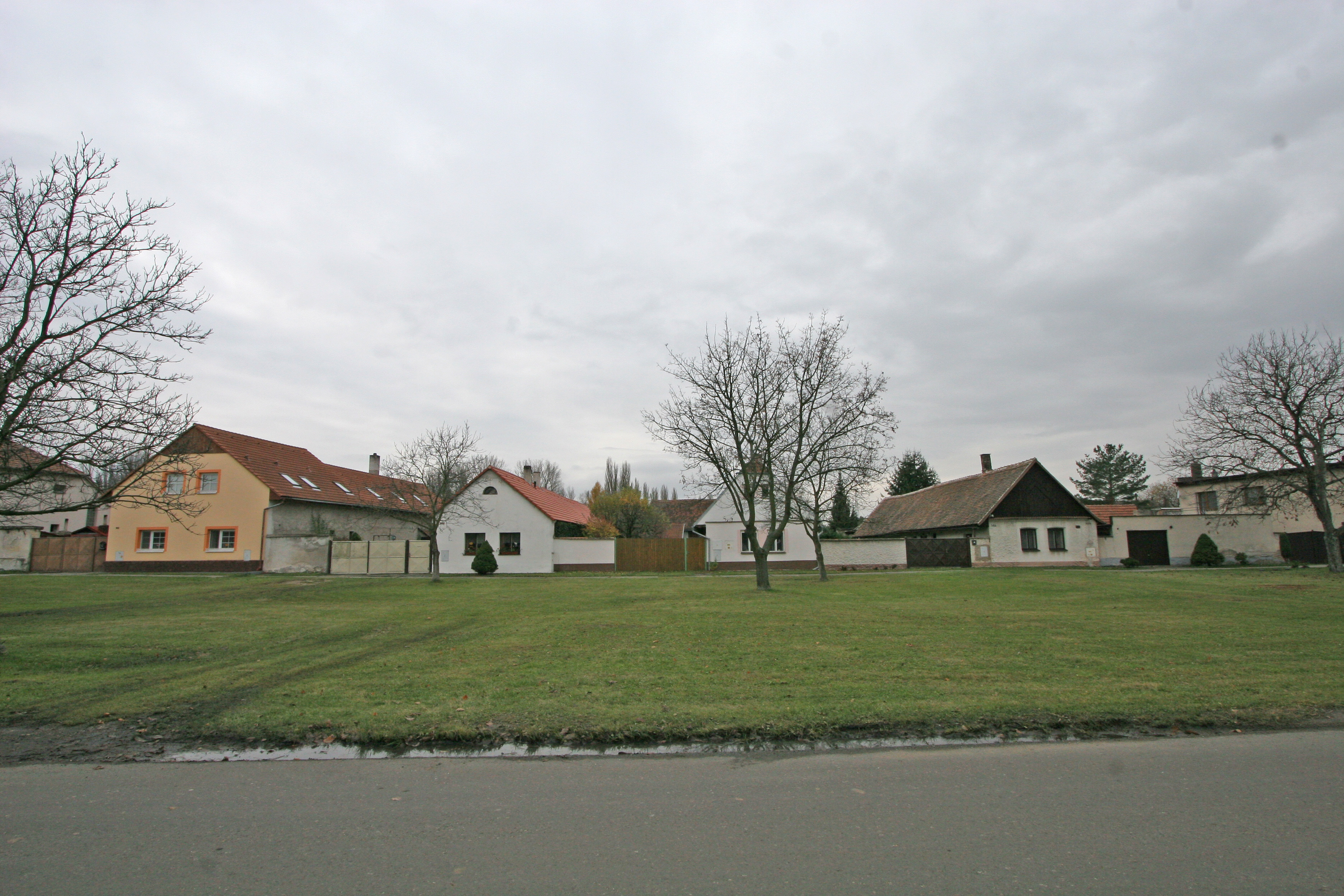 náves v Chotusicích